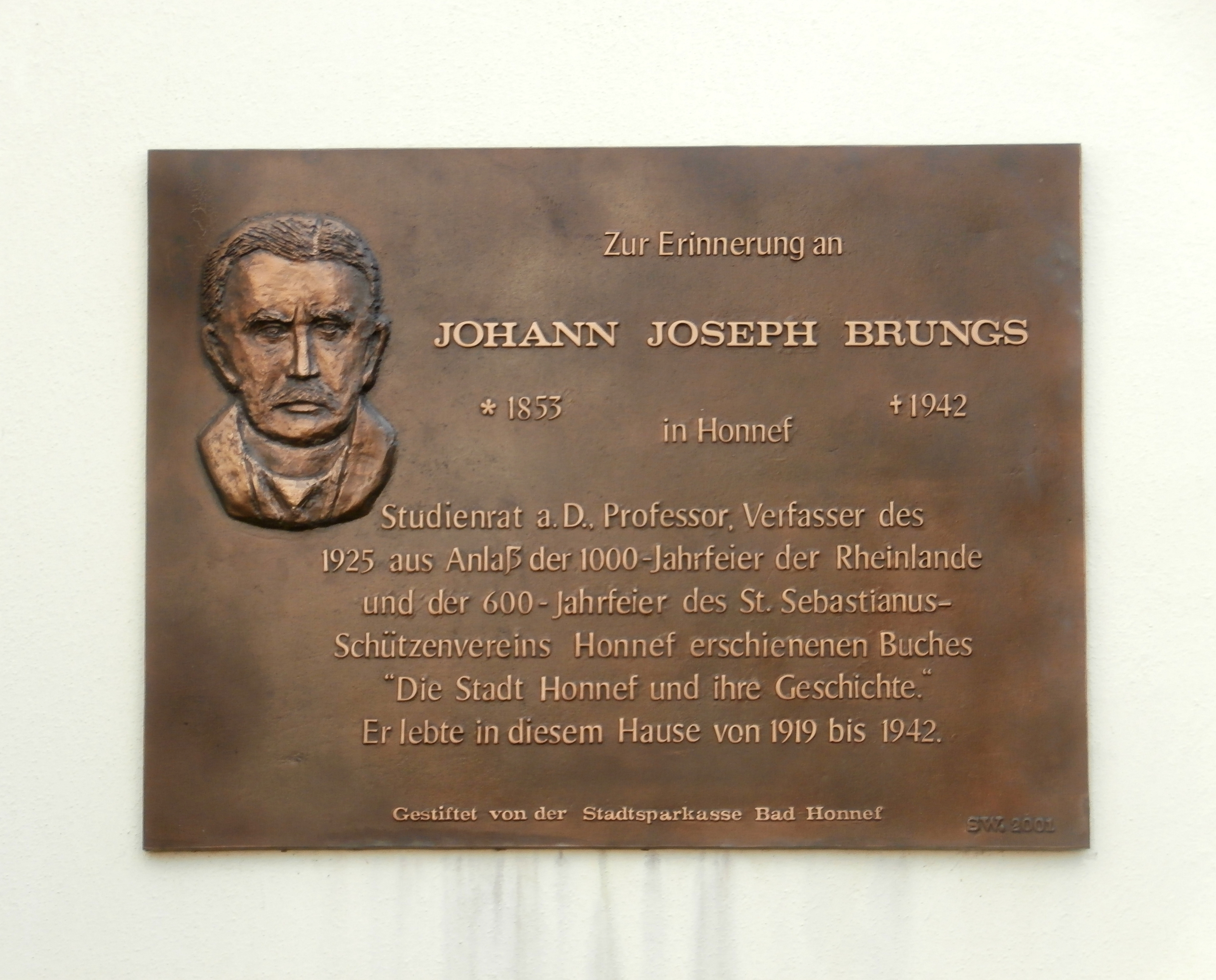 Denkmalgeschützte Villa, Weyermannallee 1a, Bad Honnef: Gedenktafel von Sigrid Wenzel mit Bronzerelief für Johann Joseph Brungs, der das Haus von 1919 bis 1942 bewohnte, enthüllt am 10. November 2001